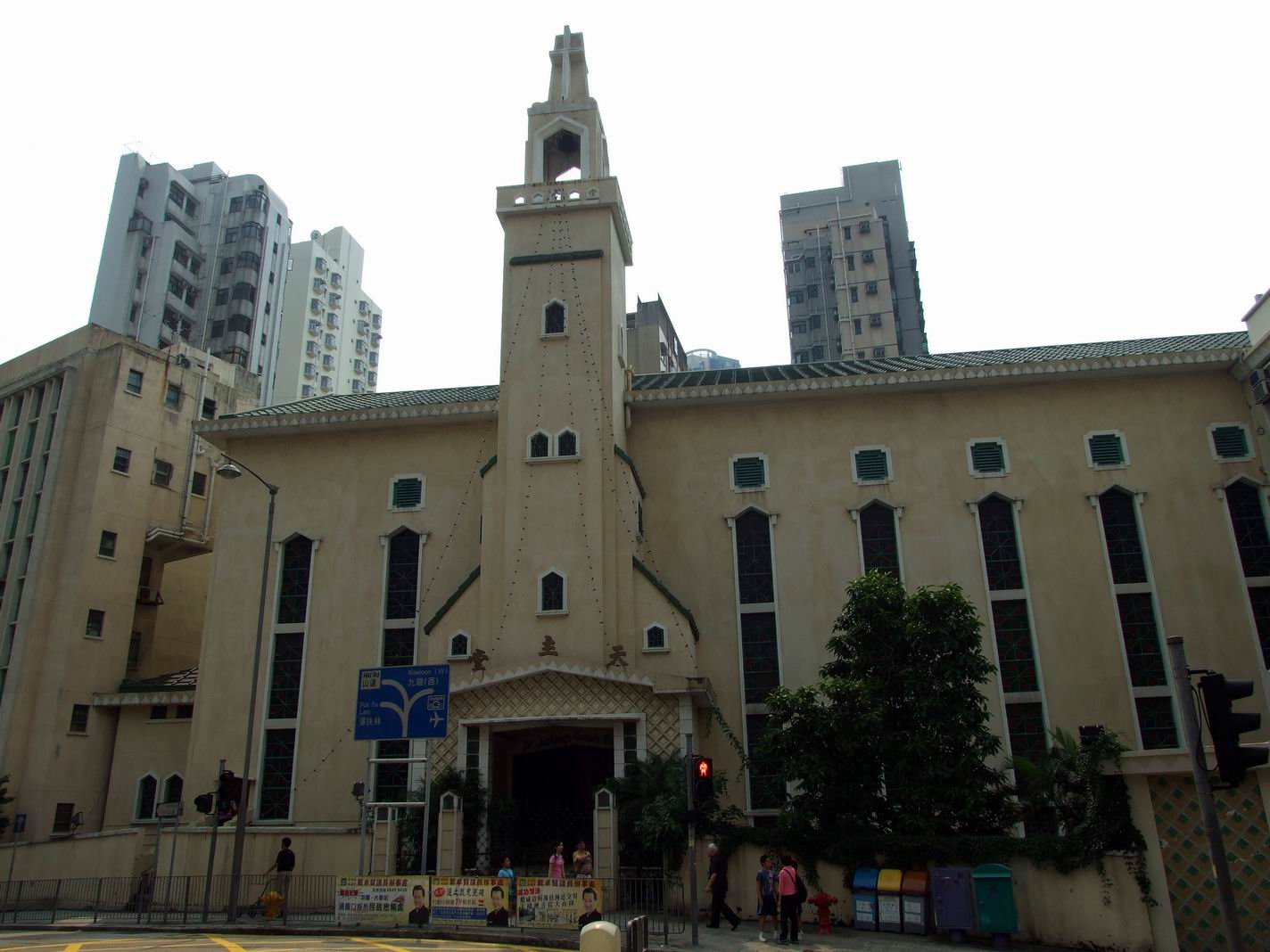 石塘咀聖安多尼堂